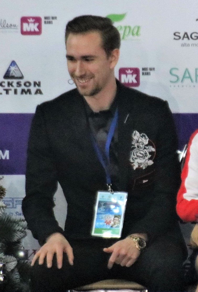 Даниил Глейхенгауз на чемпионате России по фигурному катанию на коньках 2019